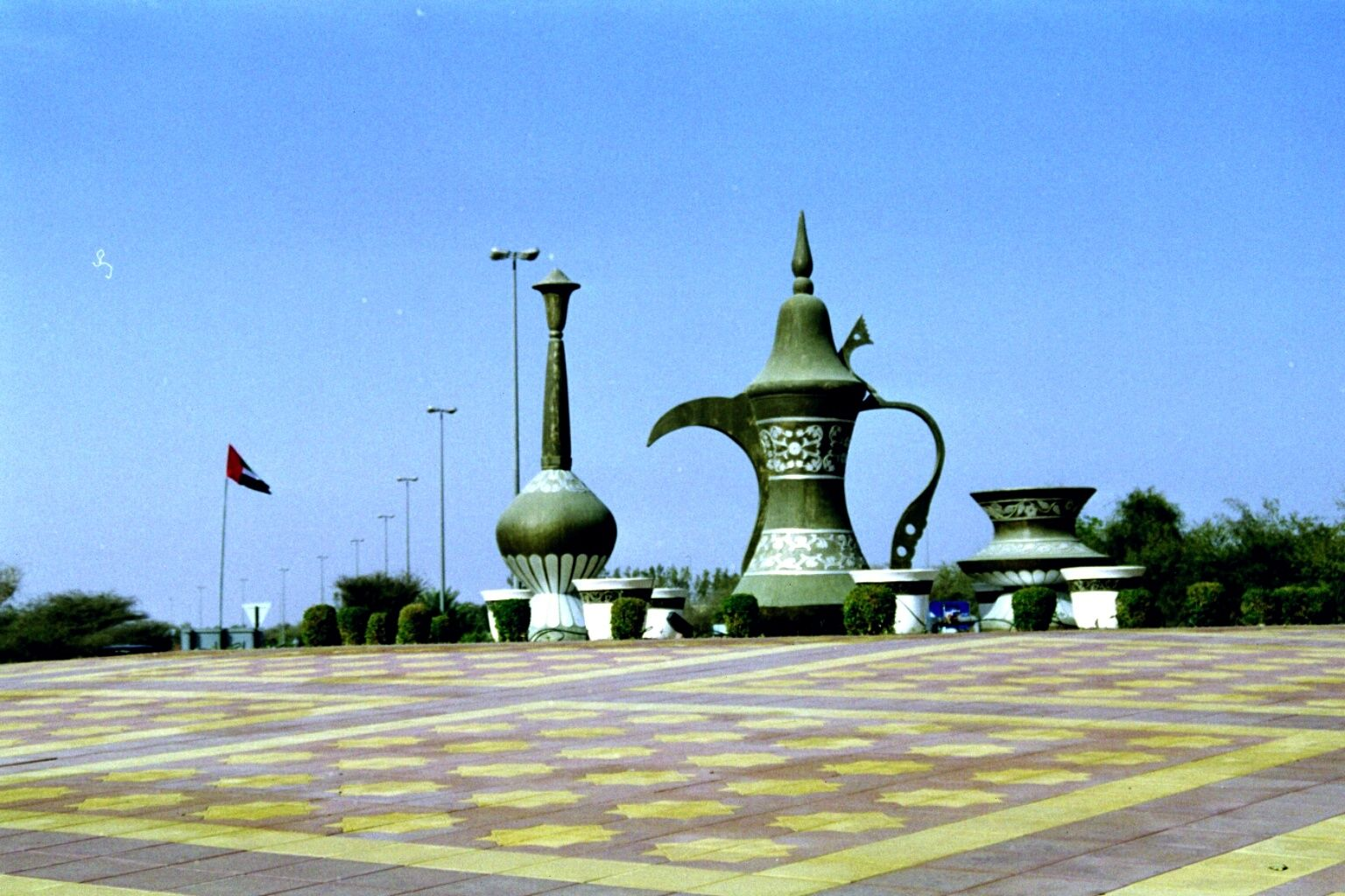 Auf dem Weg von Dubai nach Al Ain